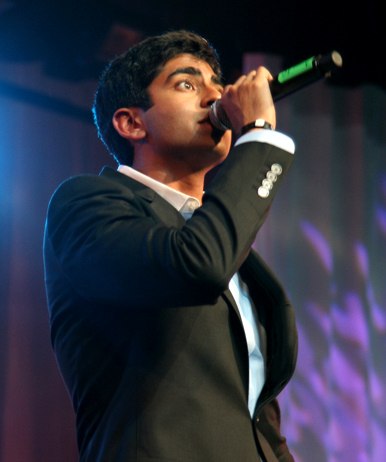 Anoop Desai